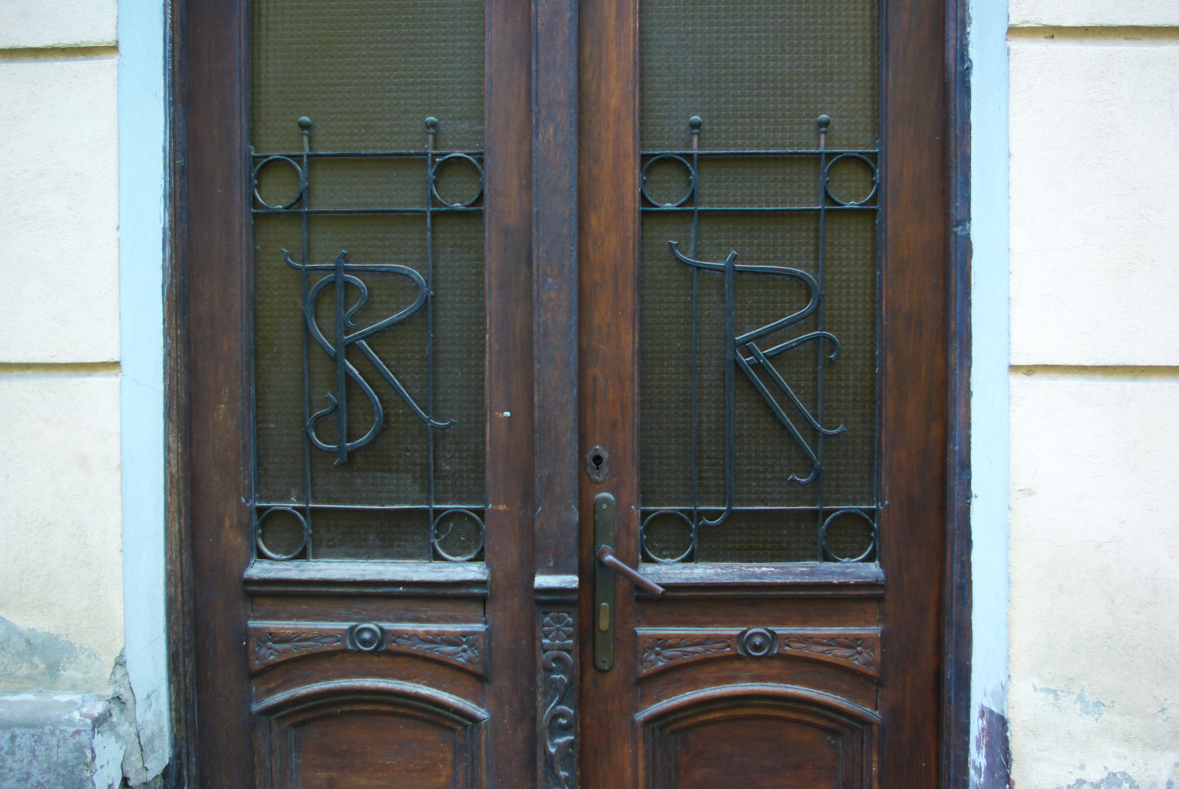 Drzwi kamienicy kamienicy przy ulicy Adama Mickiewicza 4 w Sanoku od strony zachodniej budynku. Na drzwiach zdobienia stanowiące inicjały Salomona Ramera i Klary Ramer.